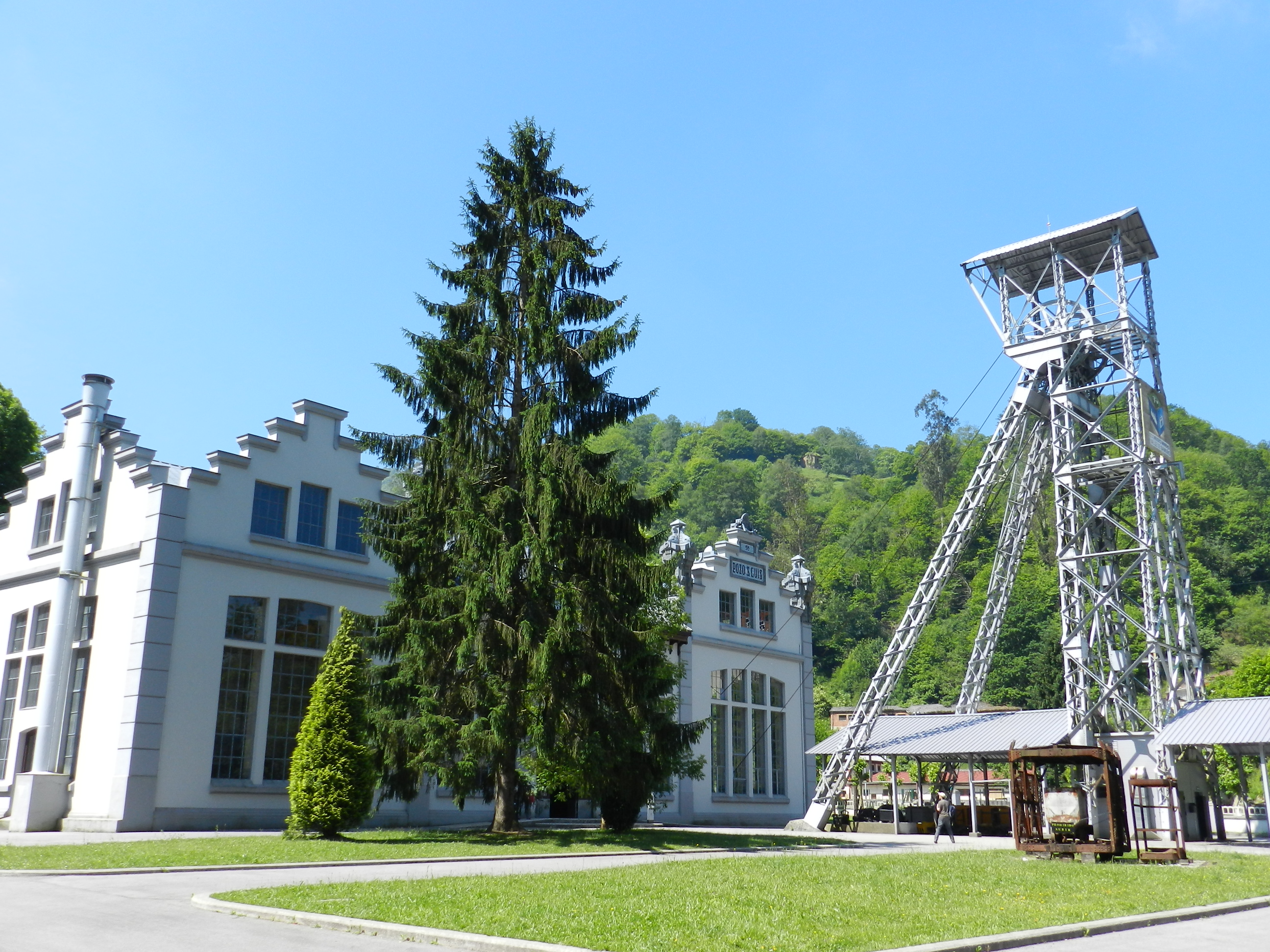 El pozo San Luis fue profundizado a finales de los años veinte, entre 1928 y 1930, por Carbones de La Nueva y estuvo en funcionamiento hasta 1969, cuando Hunosa dejó de explotarlo. Desde ese año, realizó funciones auxiliares para el cercano pozo de Samuño. Su cierre definitivo tuvo lugar en 2002. Seis plantas son las que se reparten en los 420 metros de profundidad que tiene la caña del pozo. La sexta, y última, nunca llegó a explotarse debido a que estuvo siempre inundada. El Pozo San Luis por su singularidad y grado de conservación, además de por constituir uno de los más destacados ejemplos de la industrialización de los valles centrales de las cuencas mineras, fue declarado Bien de Interés Cultural en 2013. This is a photography of a Site of Community Importance in Spain with the ID: ES1200039. Natura2000 entry, EEA entry